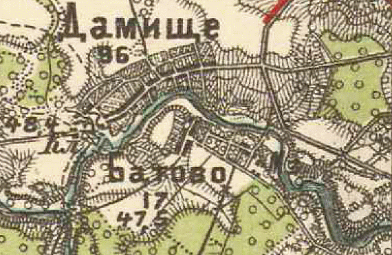 Деревни Батово и Дамище на карте района манёвров 1913 года.